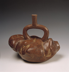 Cerámica Mochica representando yacón. Museo Larco.